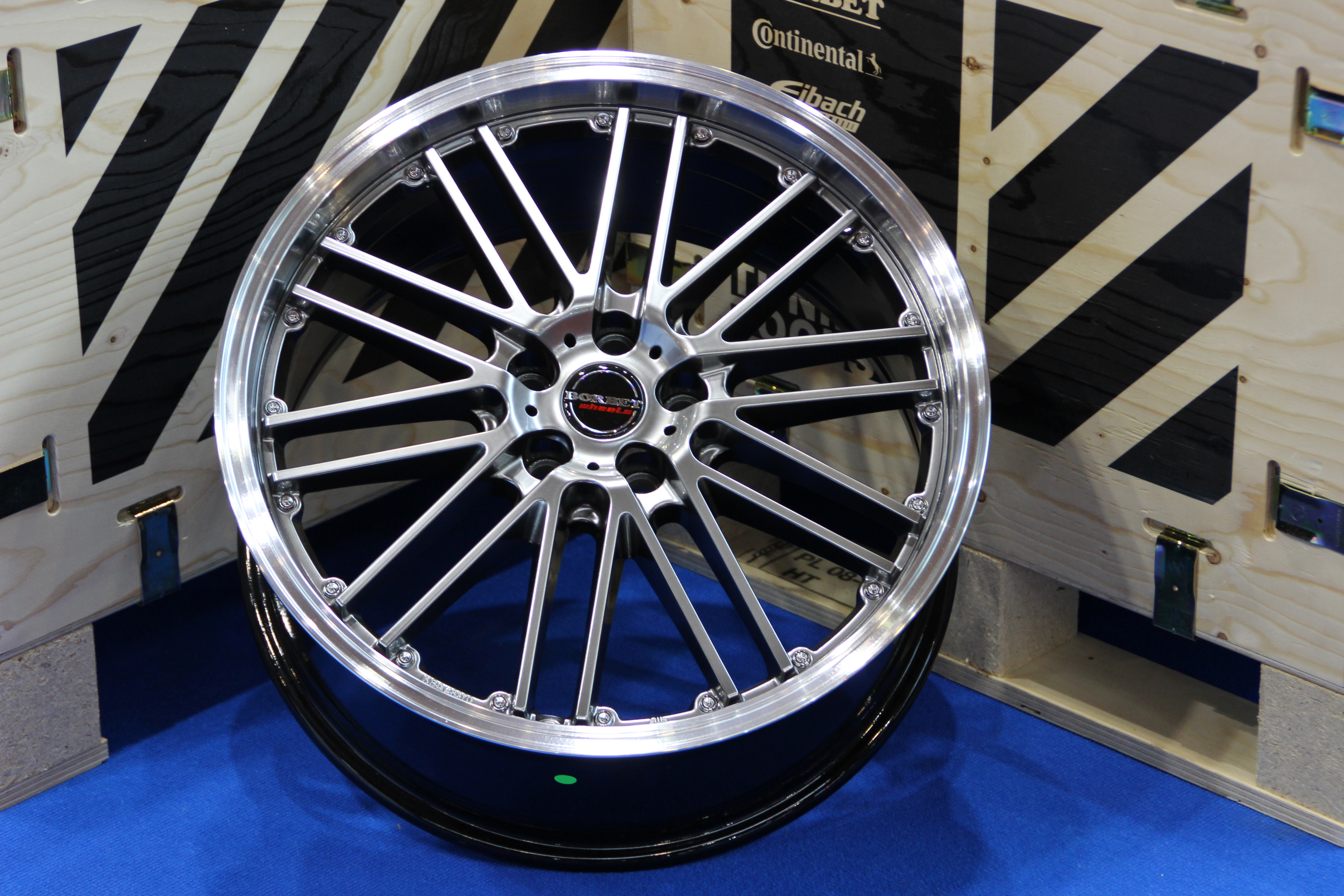 Felge der Marke Borbet auf der Tuning World